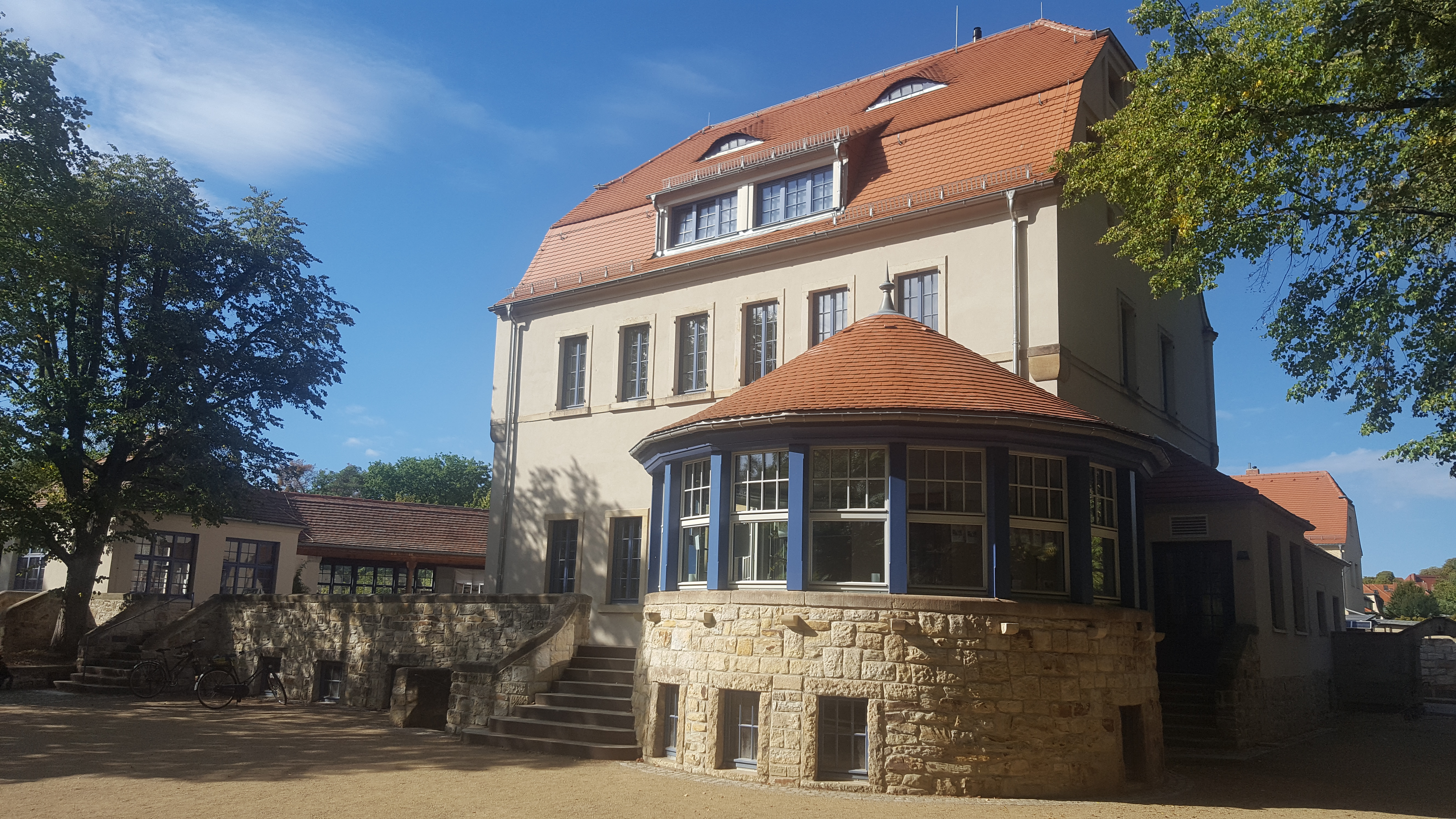 Dresden-Hellerau: Waldschänke Hellerau - Am Grünen Zipfel 2. Durch einen Förderverein wurde aus einer Ruine ein modernes Bürgerzentrum. Seit 2013 ist sie eine Stätte für Kunst, Kultur, Kommunikation und Begegnung. 1898 eröffnete die Ausflugsgaststätte “Waldschänke” und ist das älteste Gebäude im Stadtteil Hellerau. 1908 fanden in den Räumen die ersten Verhandlungen zur Gründung der Gartenstadt Helleraus statt. Mit dem Bau der ersten Häuser "Am grünen Zipfel" wurde das Gebäude 1910 von Richard Riemerschmid, im Stil der neuen Siedlung umgebaut.